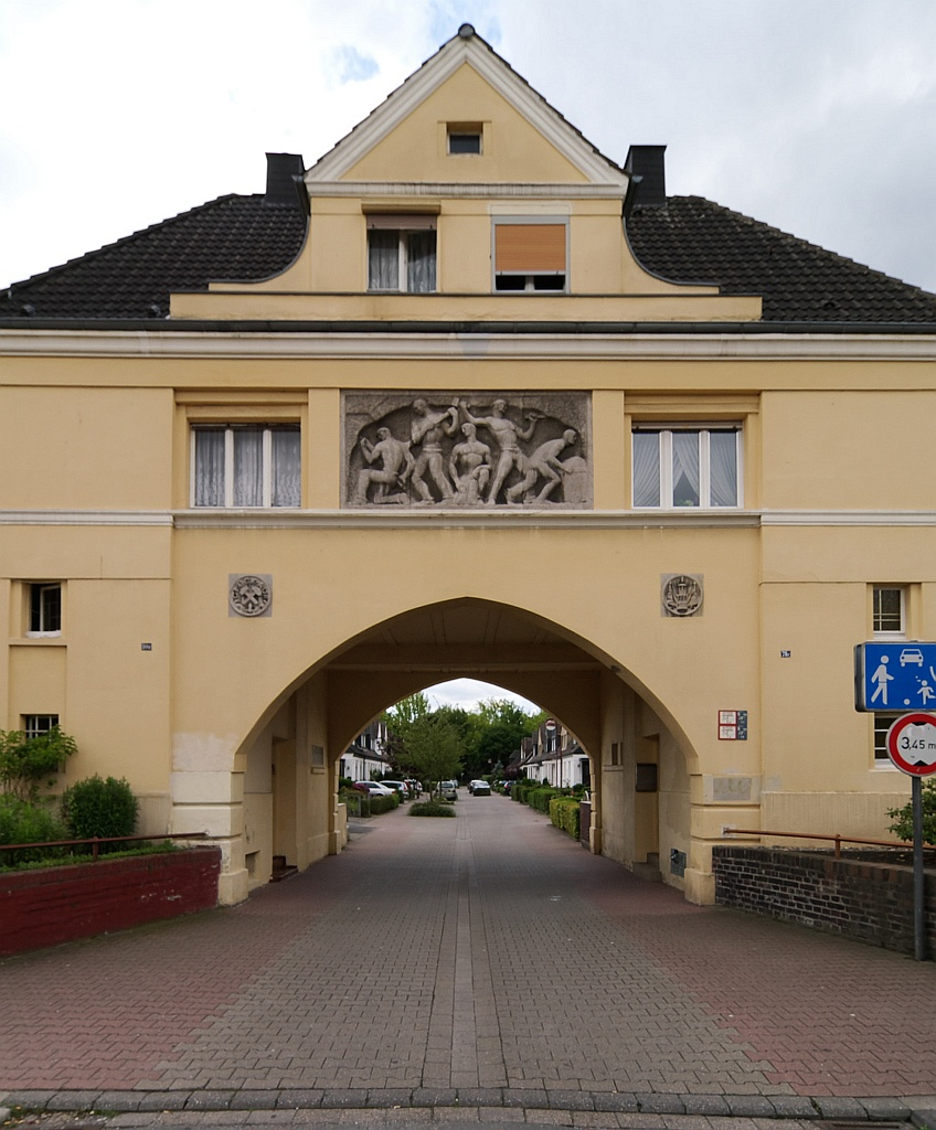 "Siedlung am Kanal", Arbeitersiedlung in Lünen, Nordrhein-Westfalen. Teil der Route der Industriekultur. Torhaus zur Kösterstraße.